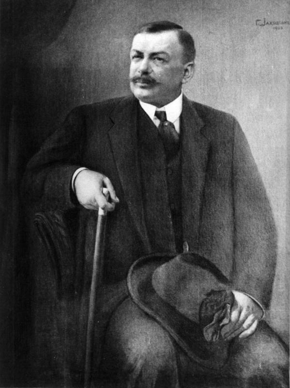 Demetrios Kalapotakis